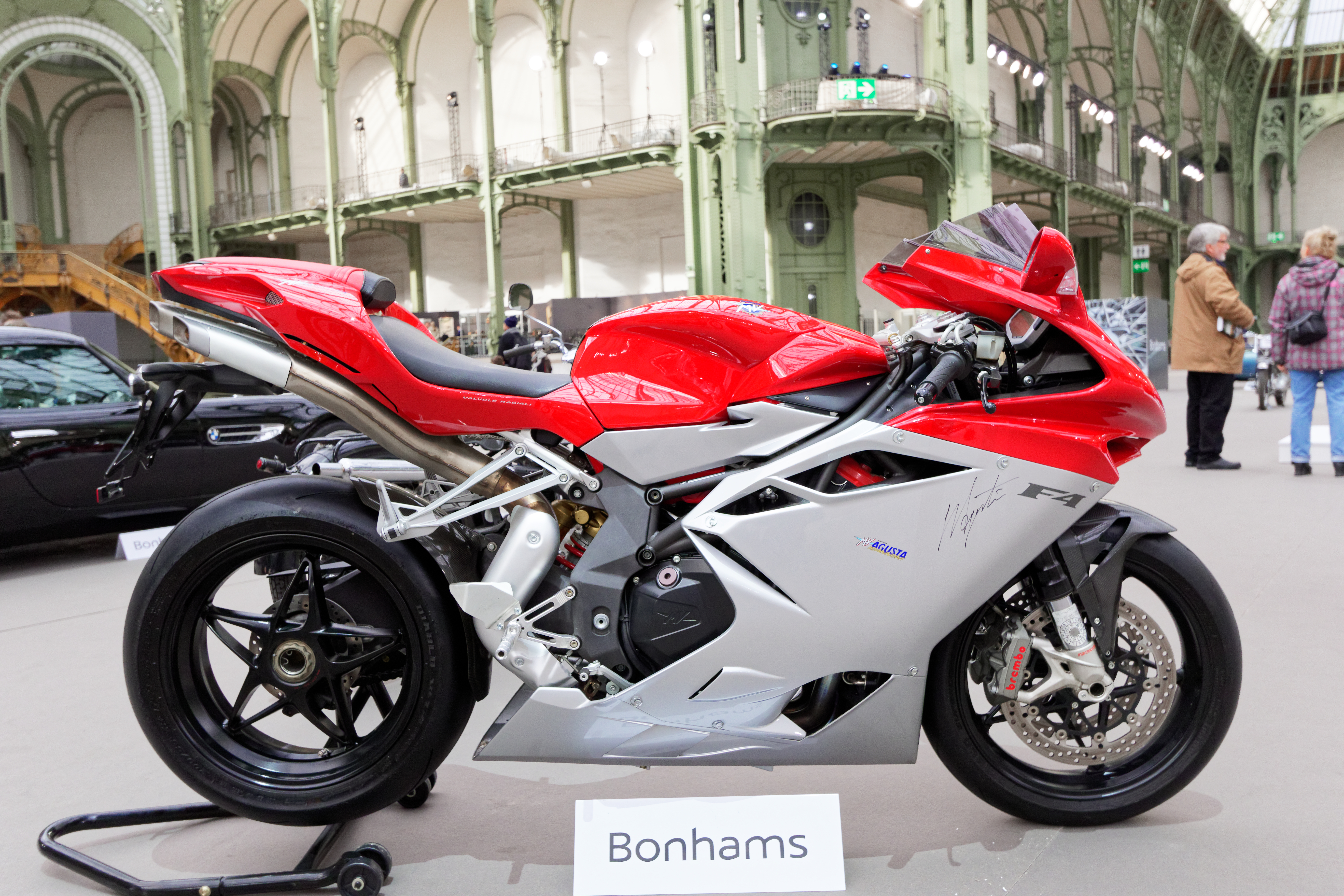 Un des véhicules présenté lors de la vente aux enchères Bonhams 2017 au Grand Palais de Paris.